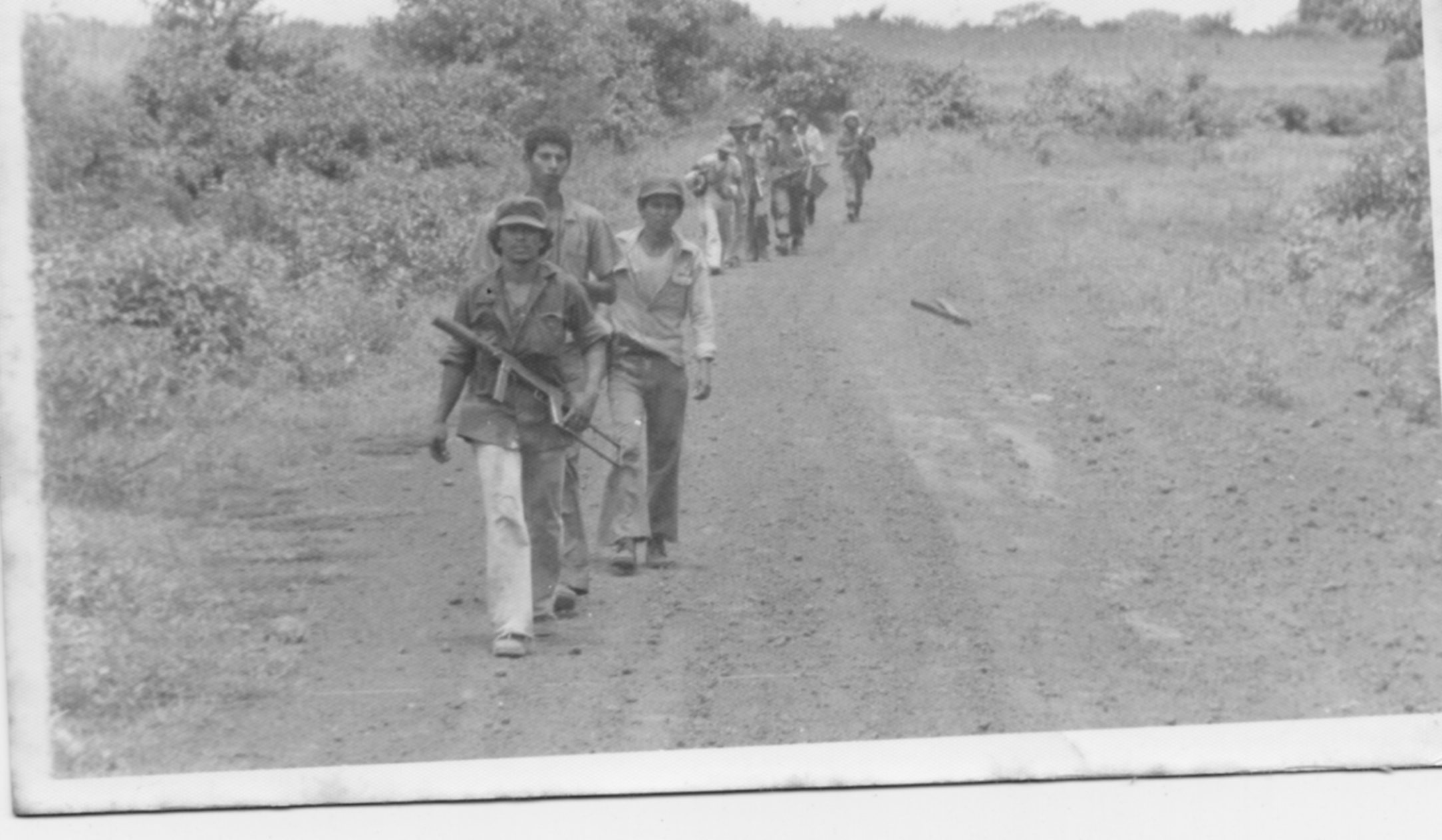 EPSON scanner Image Insurrección de León 1979 Imágenes de las acciones militares durante la insurrección de León y de la destrucción causada por los bombardeos de la Fuerza Aérea Nicaragüense (FAN) de la GN. durante los meses de junio y julio de 1979